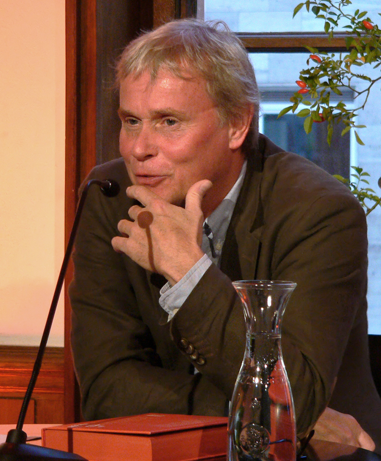 Peter Waterhouse